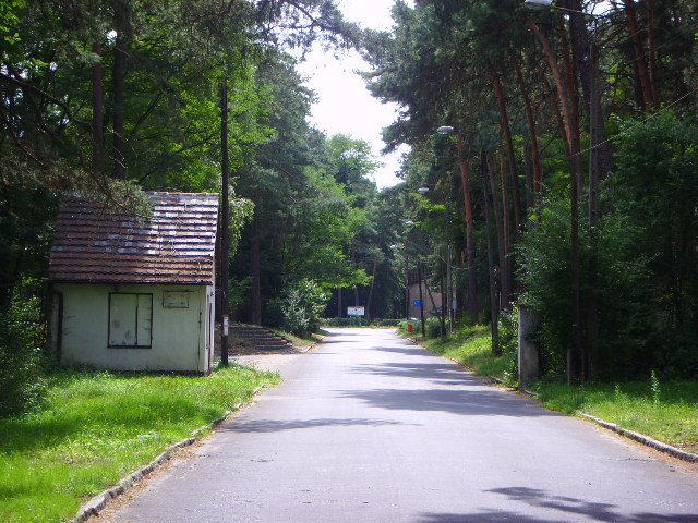 Dawne koszary w Ciborzu (do lat 50. XX w); obecnie szpital psychatryczny